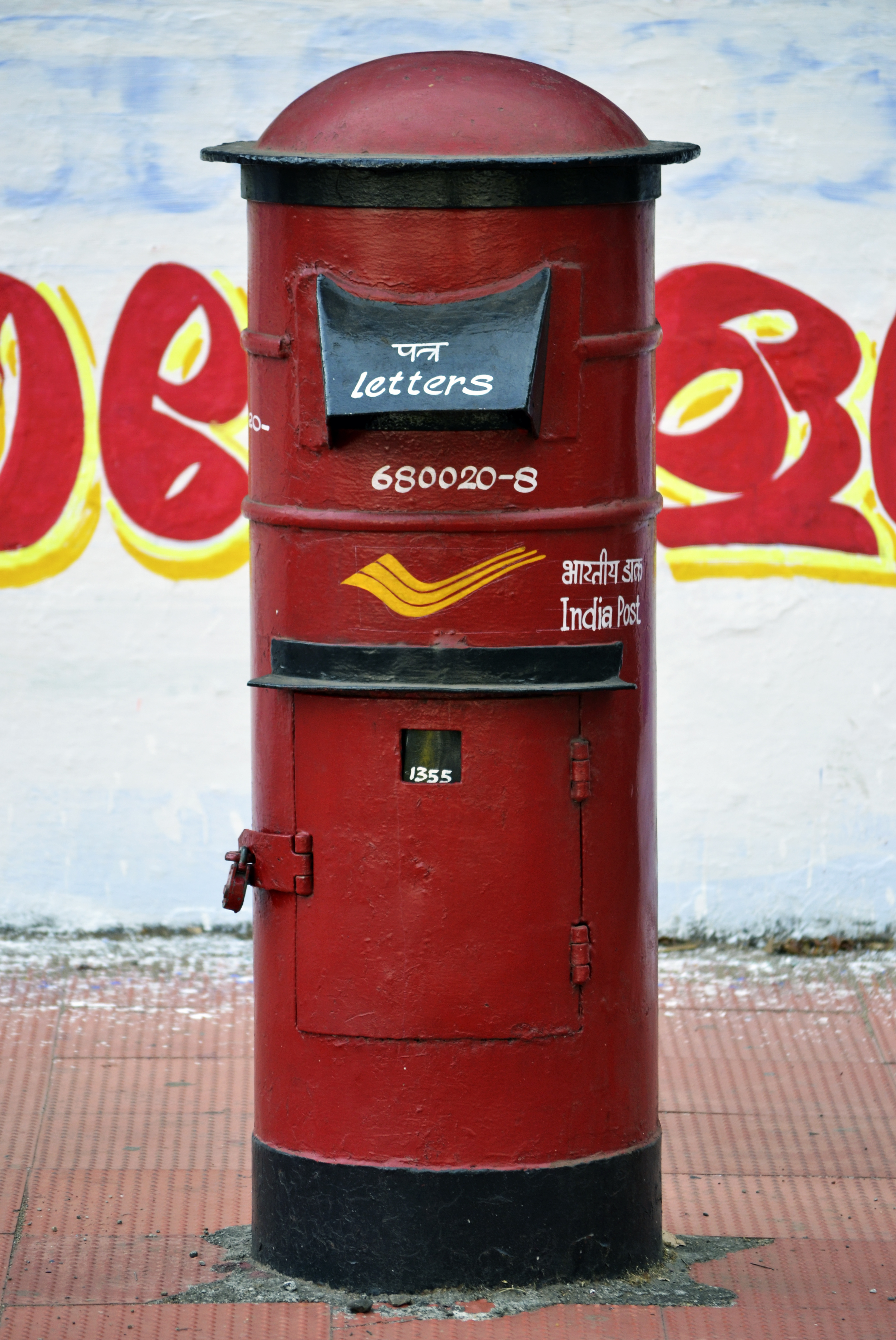 ഇന്ത്യയില്‍ ഉപയോഗത്തിലുള്ള പോസ്റ്റ്‌ ബോക്സ്. കേരളത്തിലെ തൃശൂര്‍ സാഹിത്യ അക്കാദമി പരിസരത്ത് നിന്ന് 2012-02-25 ന് പകര്‍ത്തിയ ചിത്രം